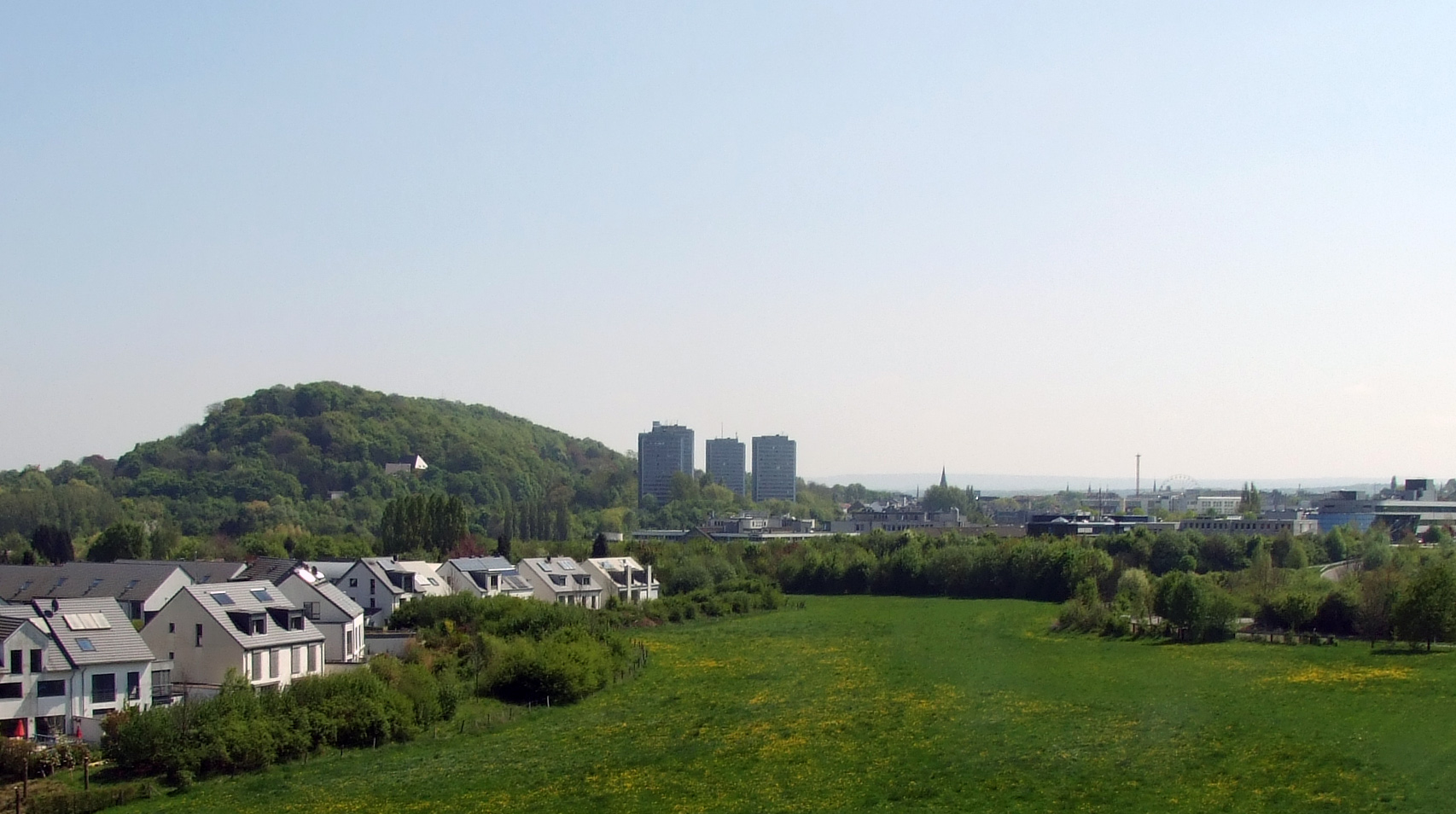 Bild vom Lousberg von Laurensberg (Aachen) aus. Aufgenommen aus der Rhein-Niers-Bahn.